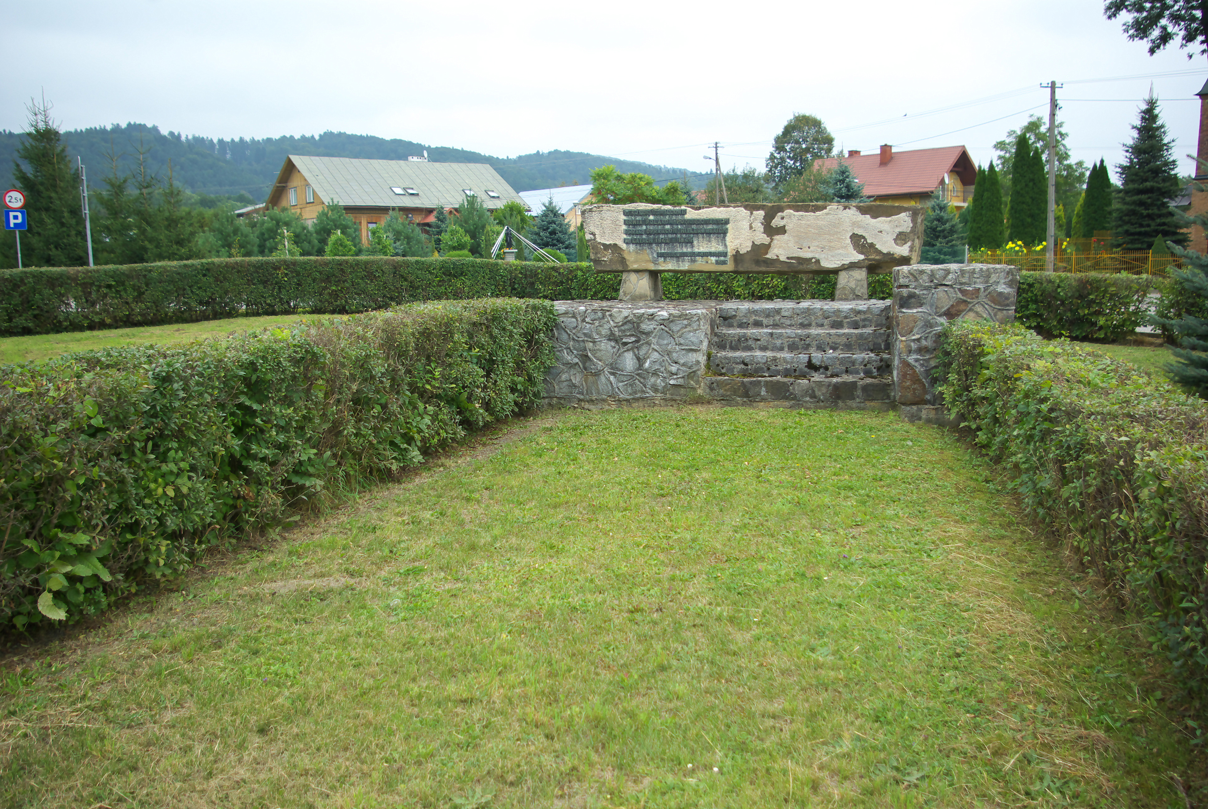 Pomnik „Miejsce uświęcone krwią Polaków pomordowanych przez oprawców hitlerowskich w latach 1942 – 1944”. Społeczeństwo miasta Sanoka 1974